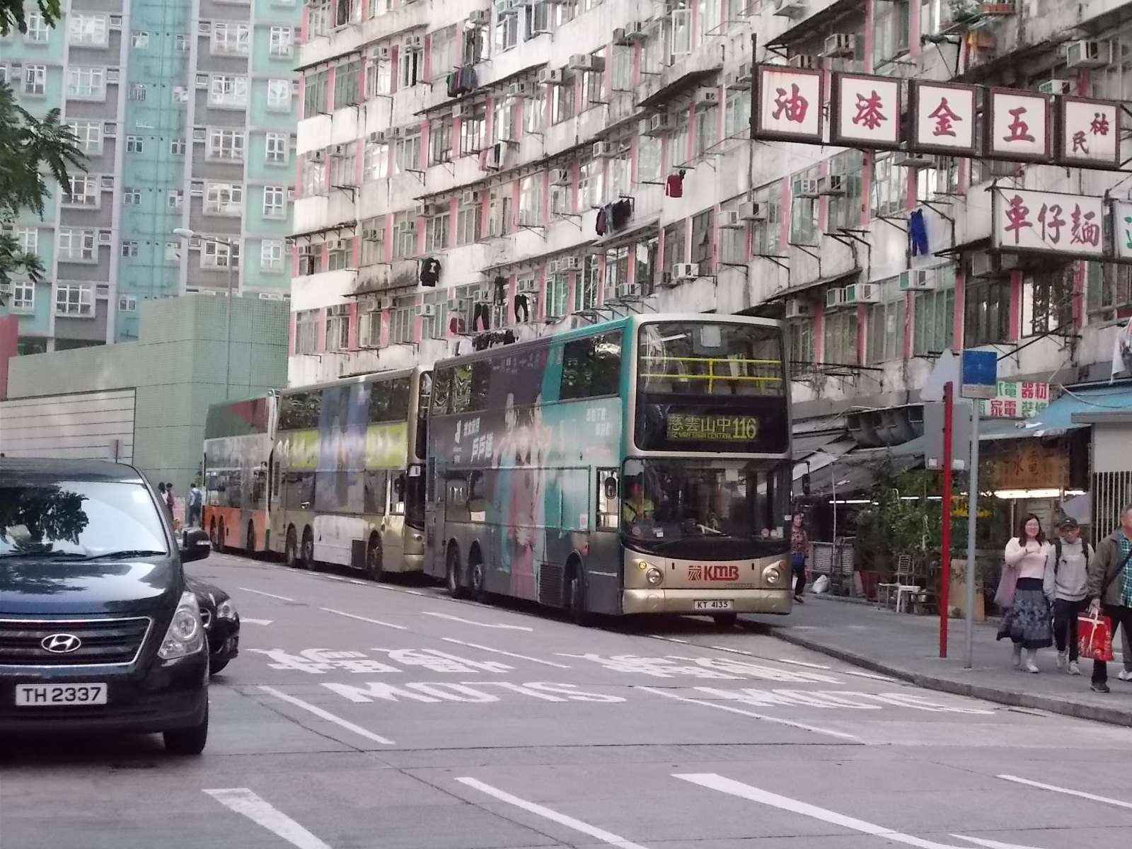 鰂魚涌巴士總站(2020年)